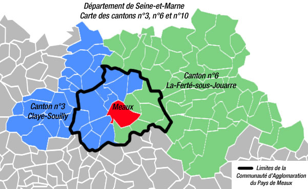 Les cantons n°3, n°6 et n°10 (Meaux) du département de Seine-et-Marne, vus par rapport aux limites de la Communauté d'Agglomération du Pays de Meaux